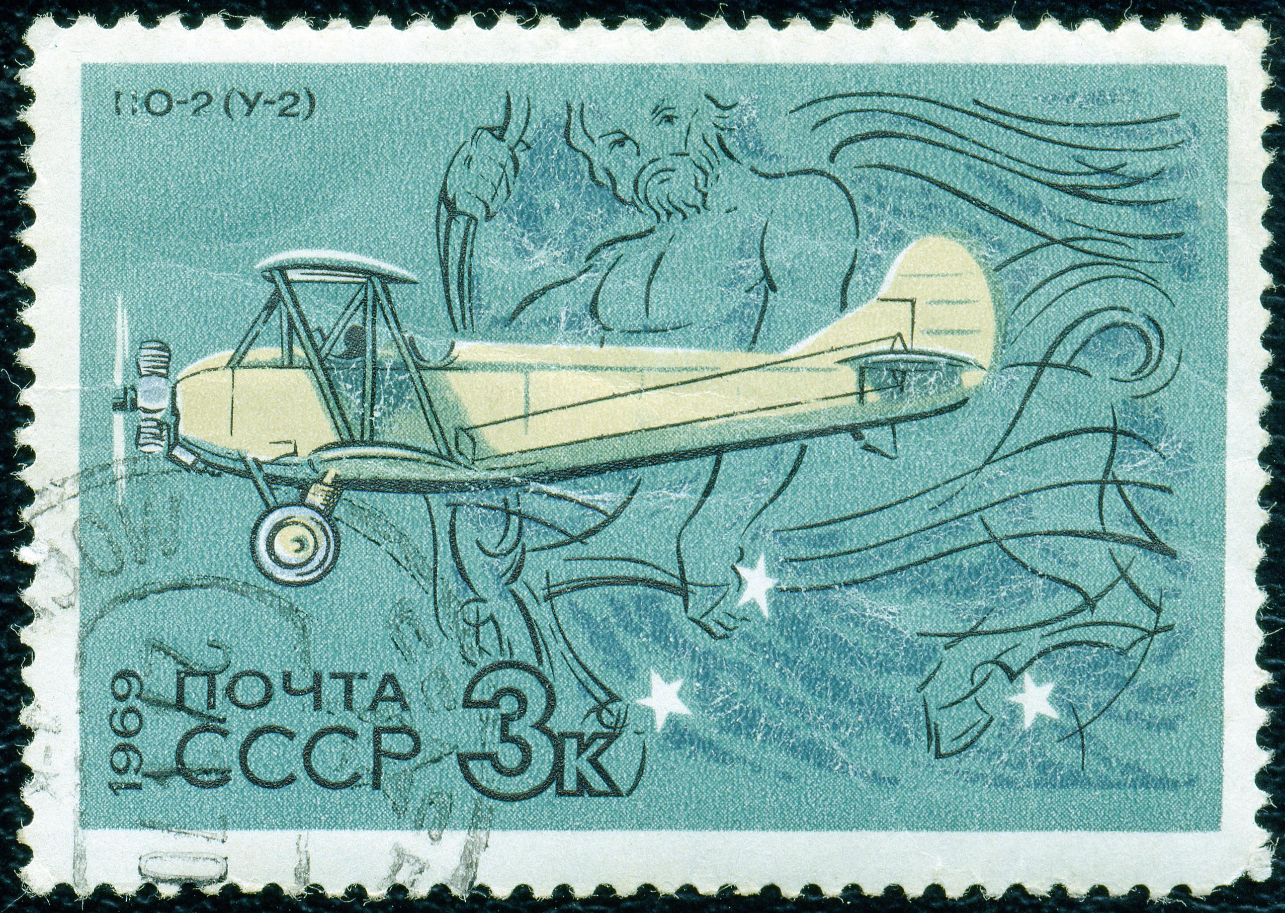 Почтовая марка СССР. 1969. ПО-2 (У-2) CPA # 3828